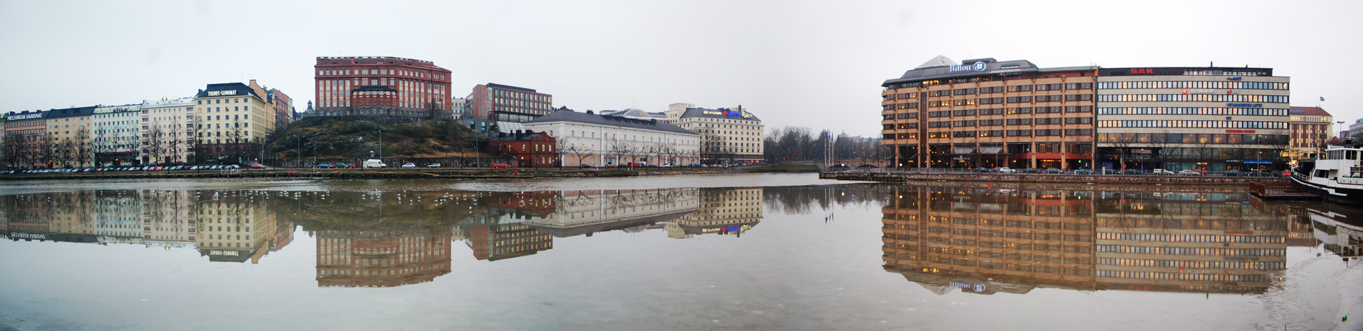 Panoraama Siltavuorensalmesta, oikealla hotelli Hilton.